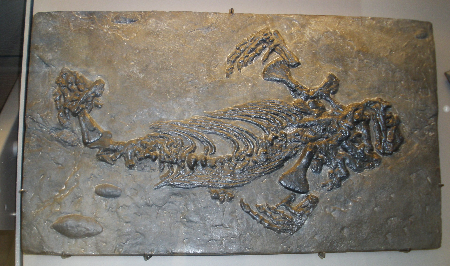 Fossil of Callibrachion, an extinct tetrapod Took the photo at Musee d'Histoire Naturelle, Brussels